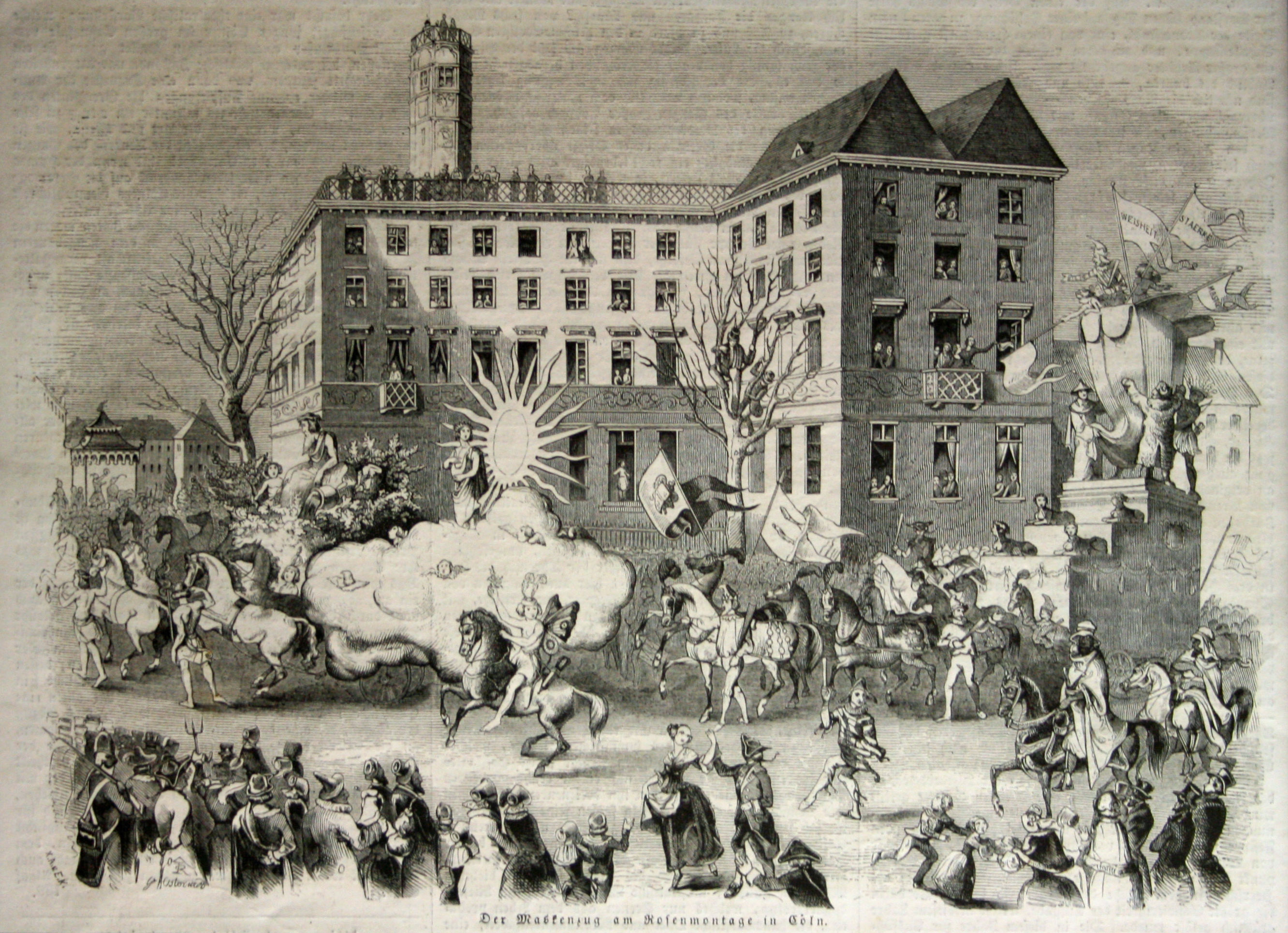 Maskenzug in Köln im Jahre 1846